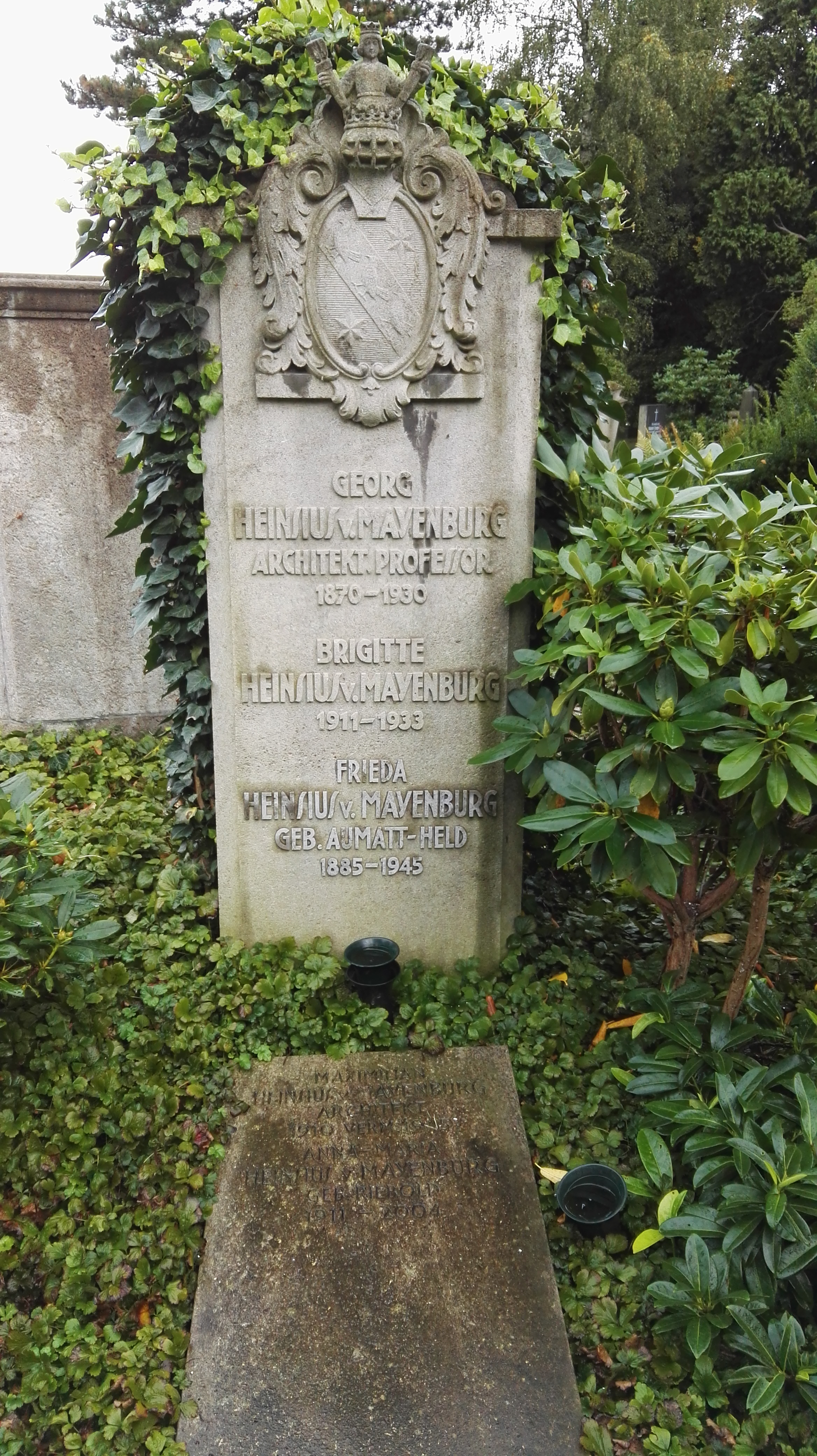 Grab des Architekten Georg Heinsius von Mayenburg auf dem Urnenhain Tolkewitz, Grabplatte für seinen Sohn Maximilian Heinsius von Mayenburg